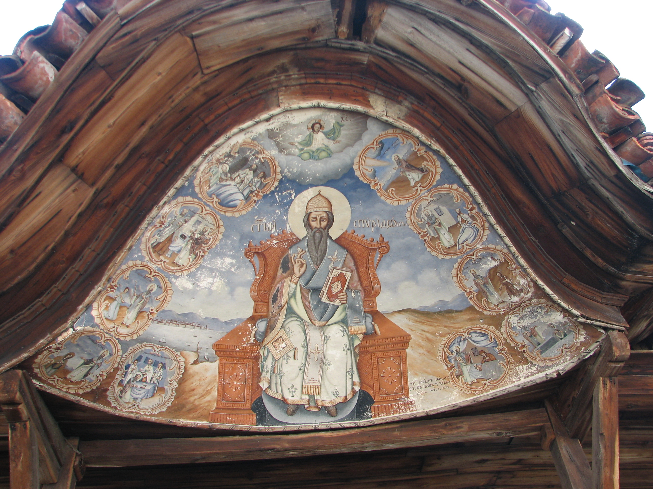 Застрашен стенопис в двора на храм "Св.Никола"